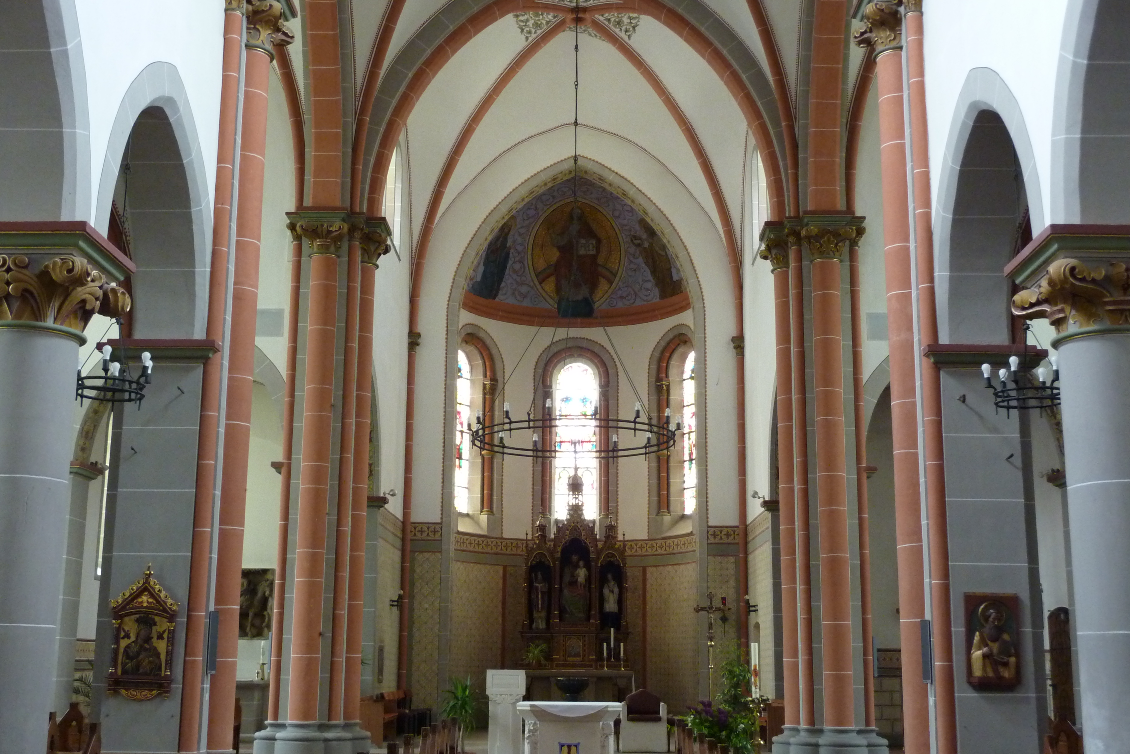 Kirche St. Martin in Bassenheim, Innenraum mit Chor